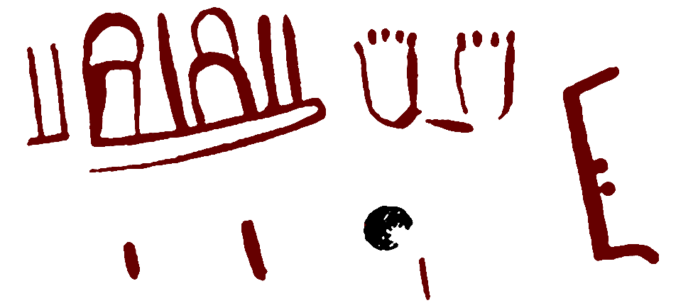 La llamada «Inscripción» del panel número 49, de la Galería B (segundo santuario) de la Cueva de La Pasiega, en el monte Castillo, localidad de Puente Viesgo (Cantabria, España)